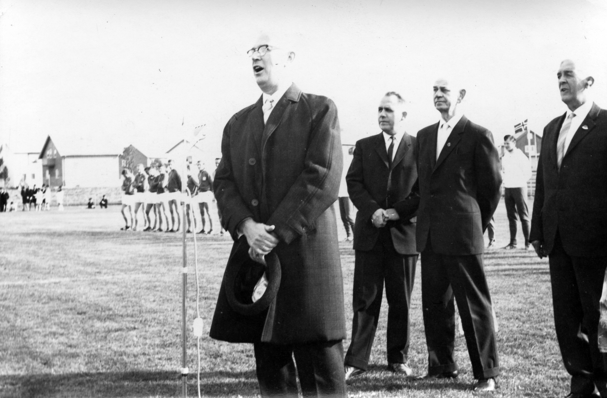 Opening of Aspmyra by Mayor Olaf Hagen